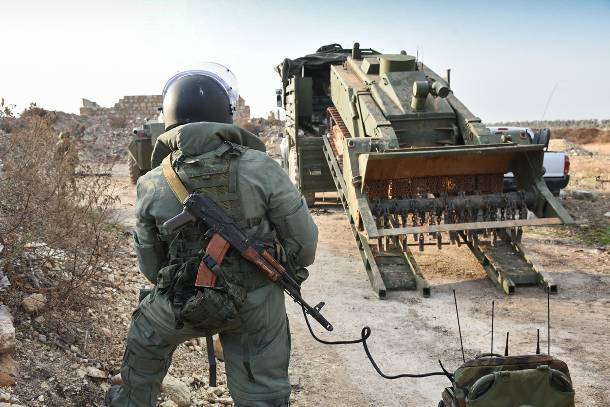 Работа сапёров Международного противоминного центра Министерства обороны России в Алеппо (Сирия)